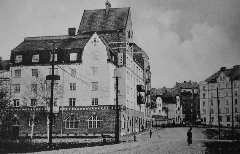 Råsunda, ca 1910. T.v. Eken 2. Byggnadsår 1910. Arkitekter G.H. Sandberg & A. Ljunggren